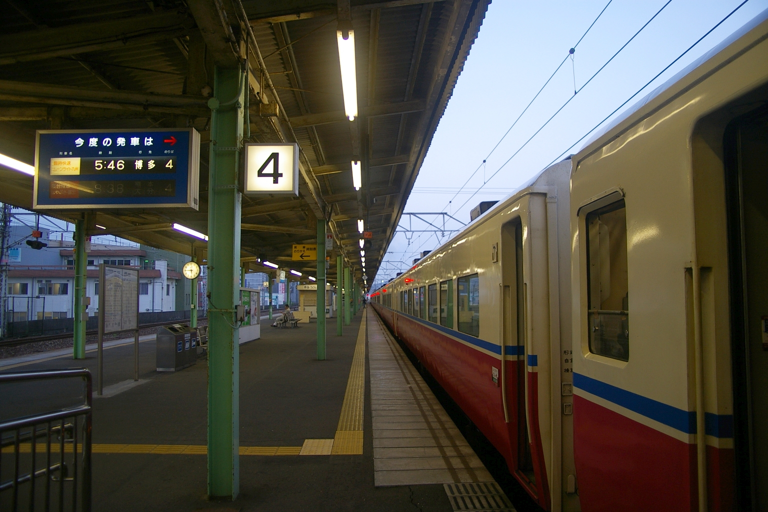 Shimnoseki sta. JR-WEST